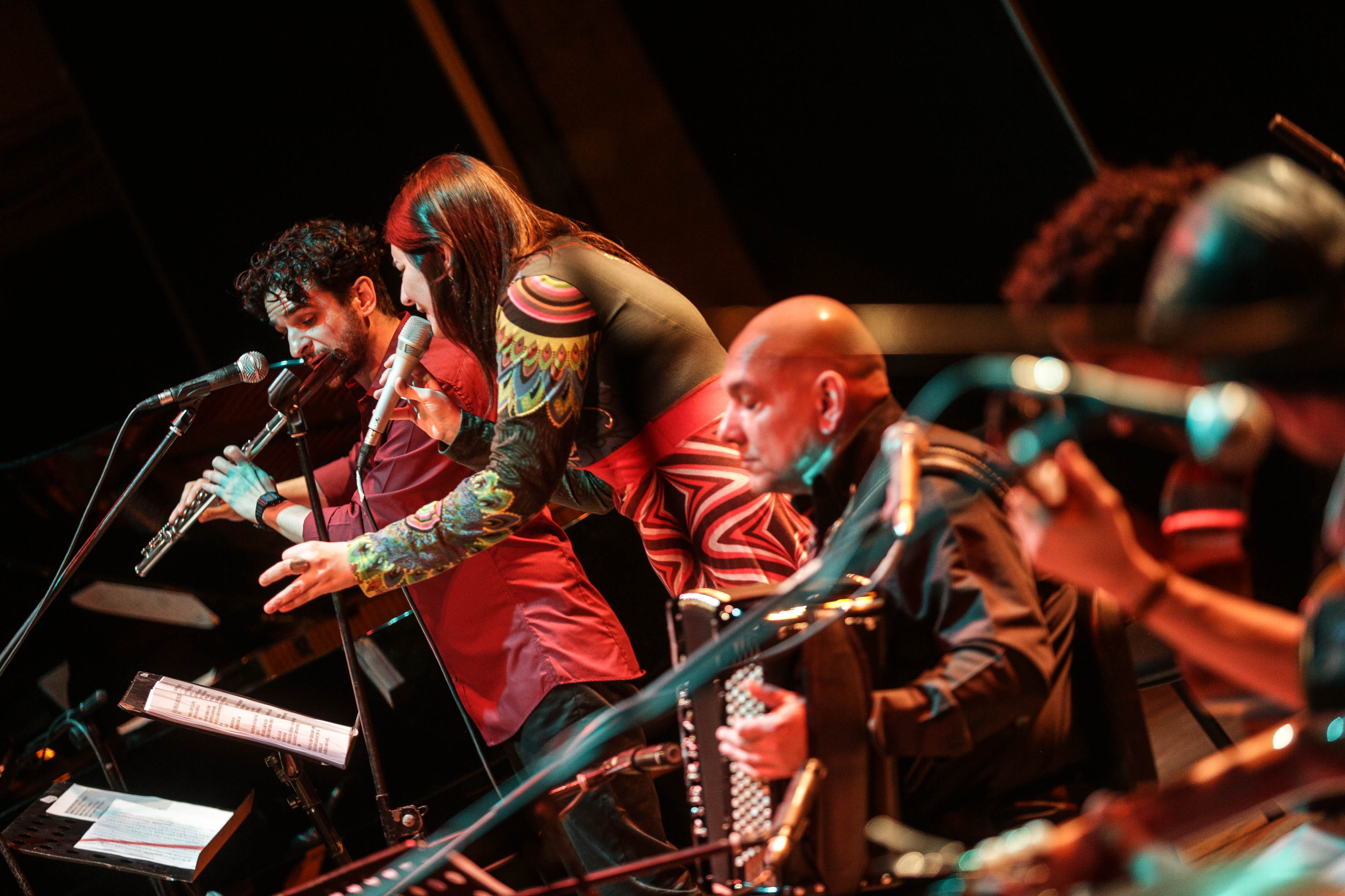 San Miguel de Tucumán, 5 de septiembre de 2015. El Ministerio de Cultura de la Nación presentó el ciclo "La Música Interior" en la provincia de Tucumán, con la participación de Luciana Jury, Sebastián Henríquez, Federico Arreseygor, Diego de la Zerda, Lucas Monzón, Jorge Luis Reales, Marcelo Moguilevsky, Federico Siksnys, Nadia Szachniuk, Carlos Moscardini, Fernando Lernoud, Emilio “Chuni” Cardozo, Lucho Hoyos, Hugo Rodríguez, Mariano Agustoni, Mauro Ciavattini, Mara Szachniuk, Pablo Fraguela, Florencia Bernales, Manuel Sija, Aldana Bozzo, Juan Martín Caraballo, José González, Nini Flores, Agustín “Chungo” Roy, María de los Ángeles “Chiqui” Ledesma, Juampi di Leone, Leonel Iglesias, Ariel “El Furia” Alberto.